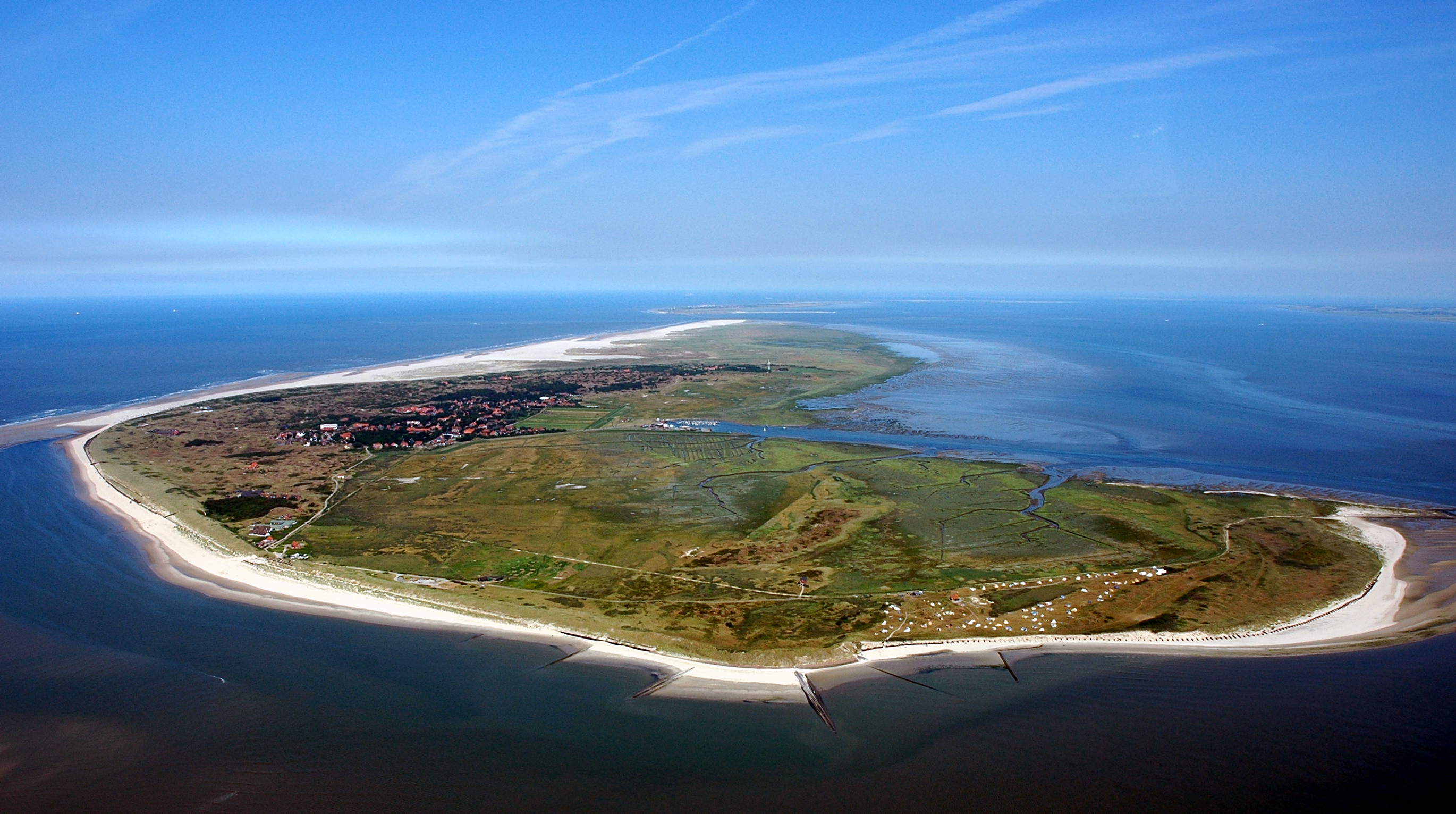 Luftaufnahme Spiekeroog